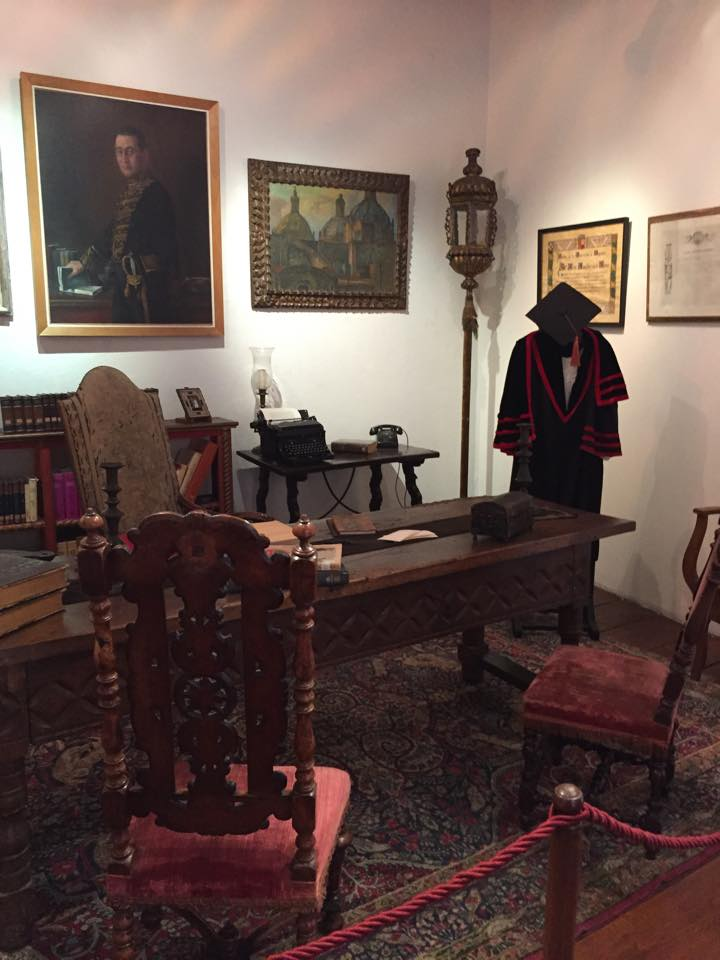 Despacho de Isidro Fabela en la Casa del Risco